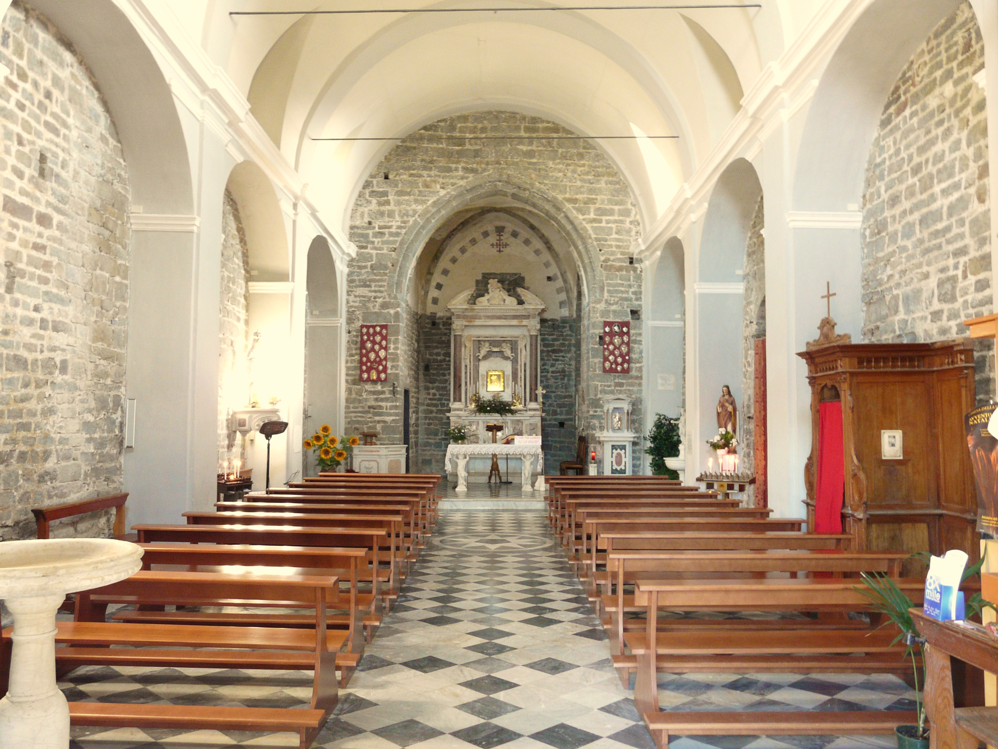 Chiesa di Nostra Signora della Salute, Volastra, Riomaggiore, Cinque Terre, La Spezia, Liguria, Italia